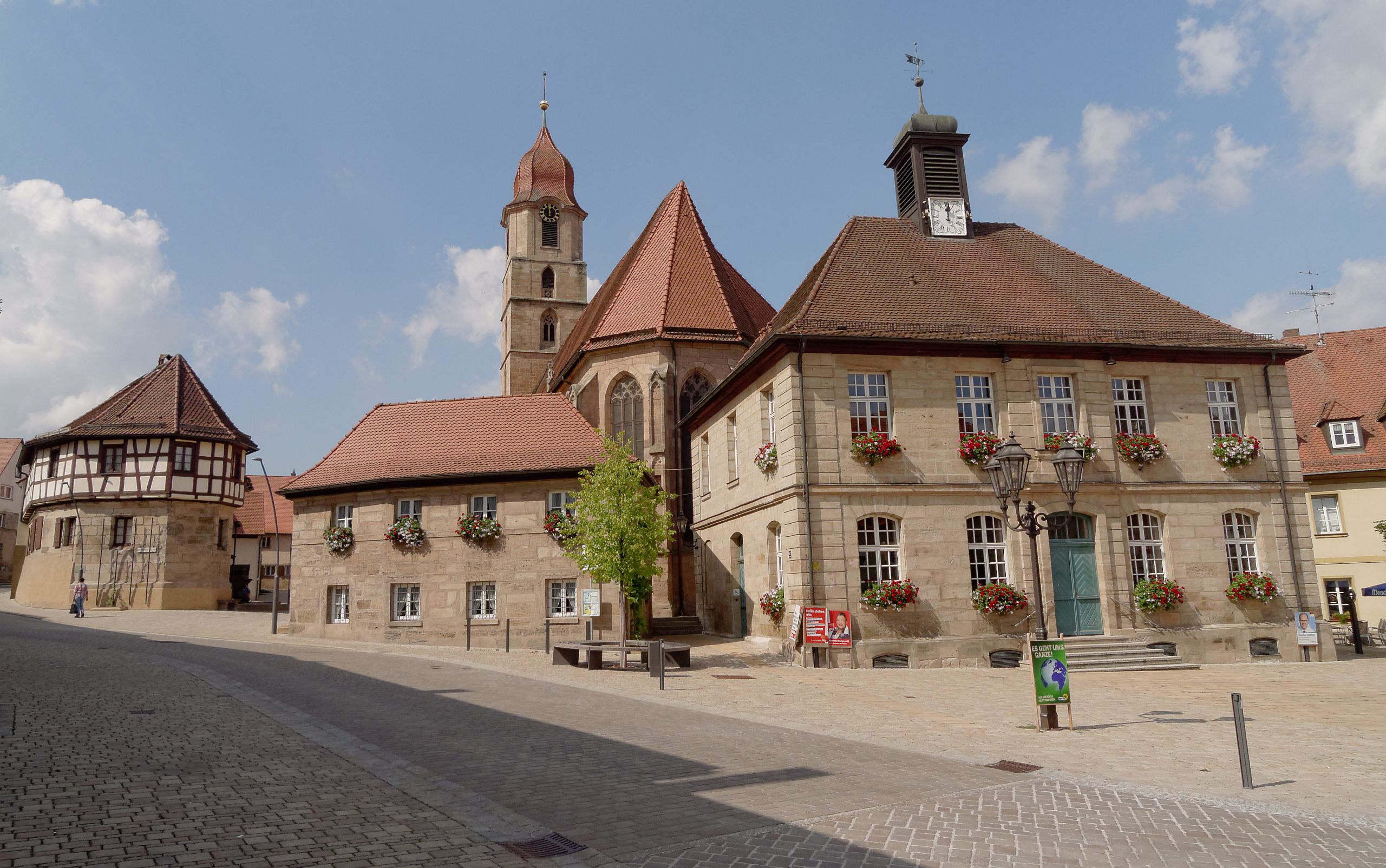 Das Zentrum (Prinzregentenplatz) mit dem Heimatmuseum (links), Altes Rathaus (rechts) und Kloster (Bildmitte im Hintergrund)